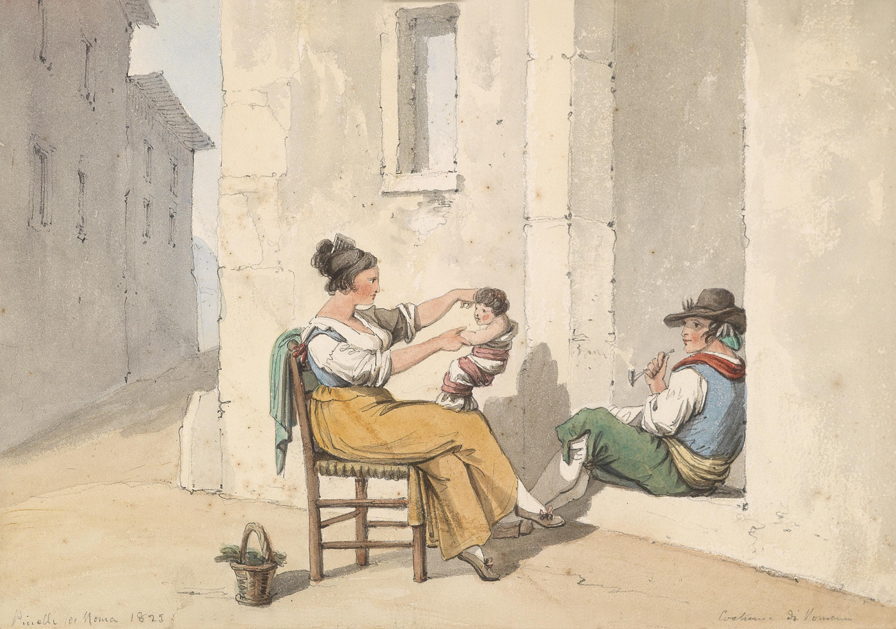 Italienische Gasse mit einer Familie vor dem Haus, signiert und datiert Pinelli a Roma 1825, Aquarell auf Papier, 19 x 28 cm